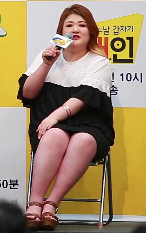 (TV TEN) KBS2 외개인 제작발표회 - 김준현&이국주 대세 개그맨들의 라이벌은